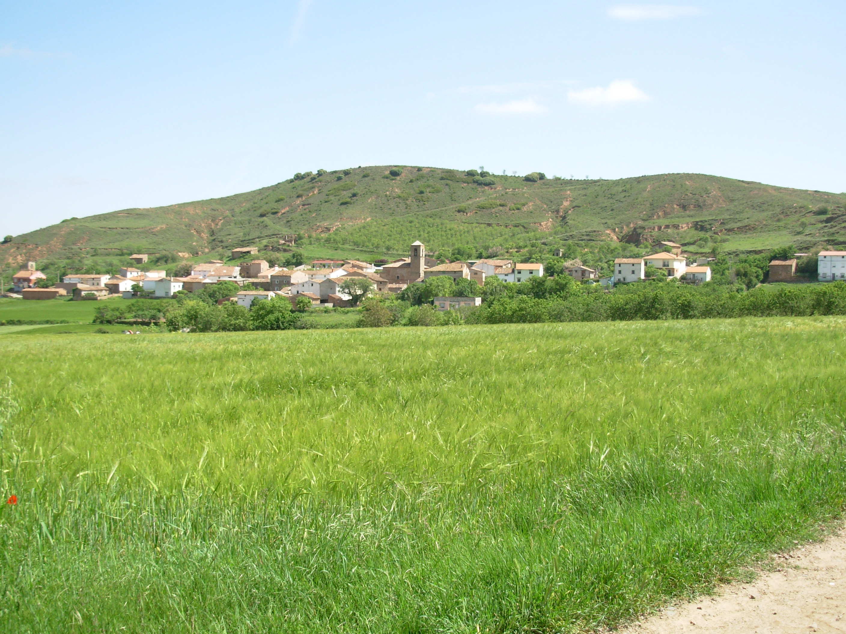 Vista general de Aldealobos desde un camino cercano